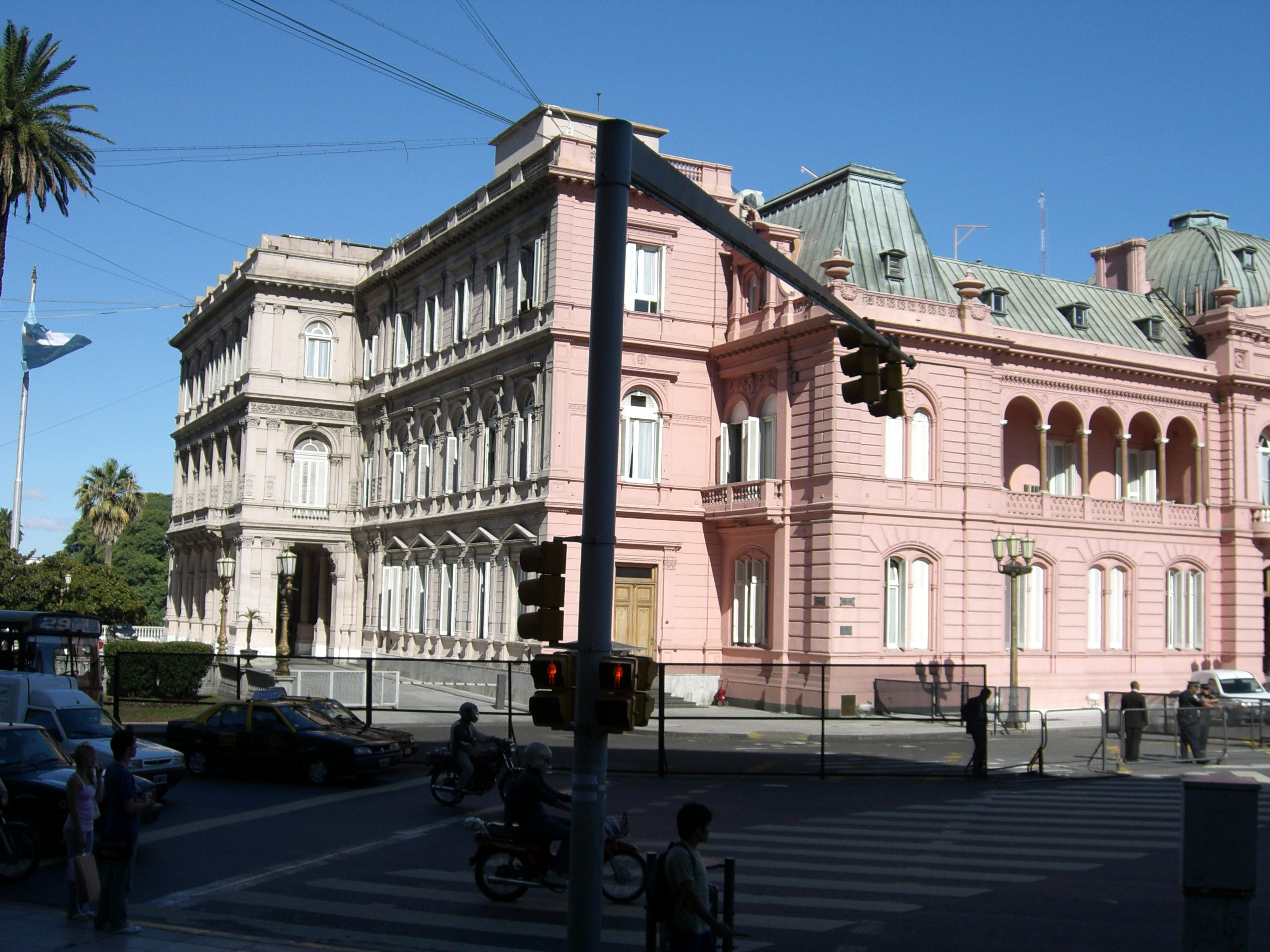 Casa Rosada, Buenos Aires, Argentina